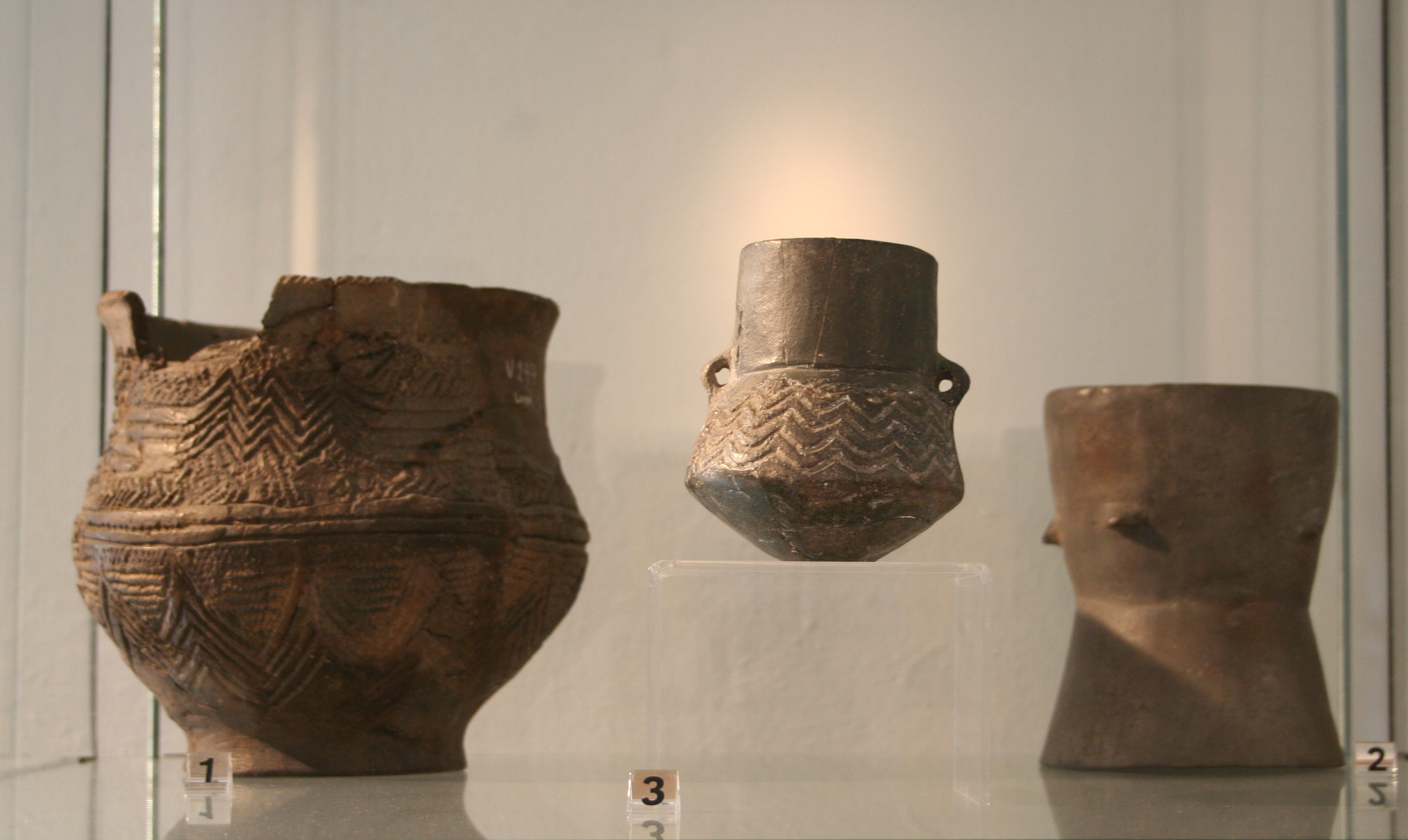 1: Gefäß der Rössener Kultur aus Losse; 2: Nachbildung einer Tontrommel, Alttiefstichkeramik, aus einem Großsteingrab bei Leetze; 3: Amphore der Alttiefstichkeramik aus dem Großsteingrab Bretsch 5; Johann-Friedrich-Danneil-Museum, Salzwedel